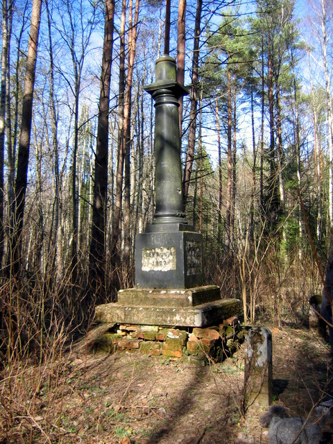 William Richard Gendti mälestussammas Merikülas